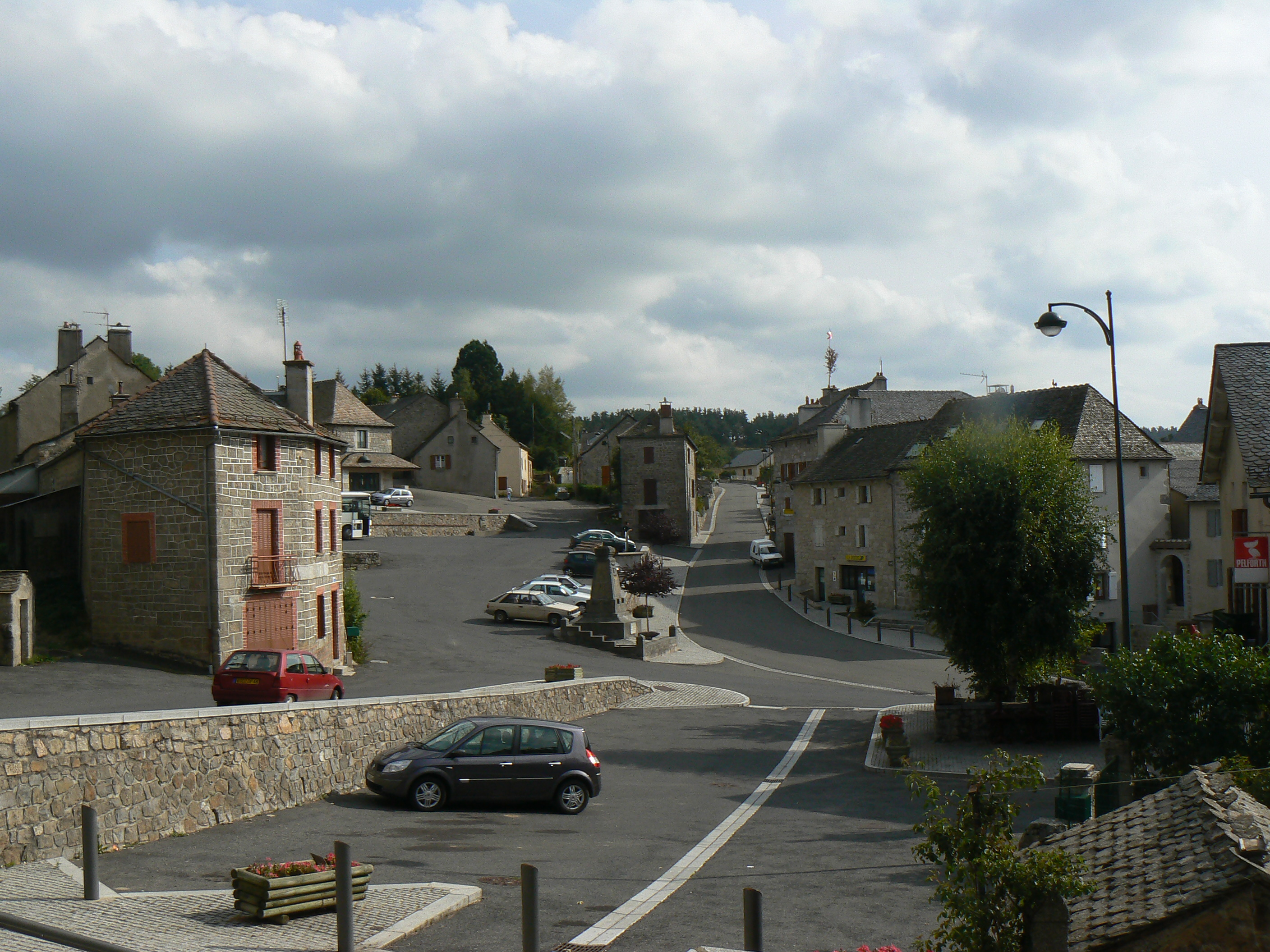 Place du village de Rieutort-de-Randon en Lozère (France)